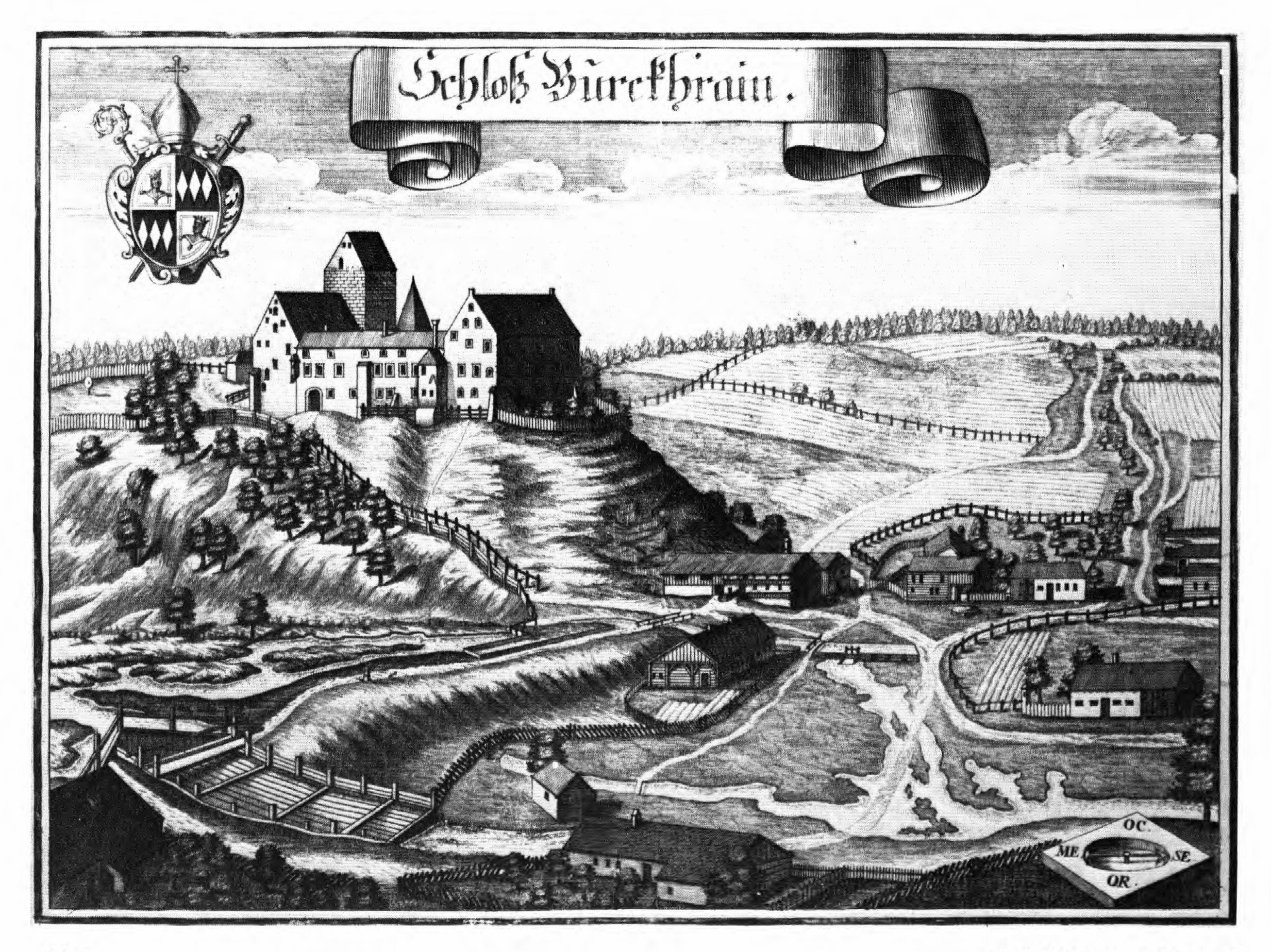 Schloss Burgrain nach einem Stich von M. Wening von 1702